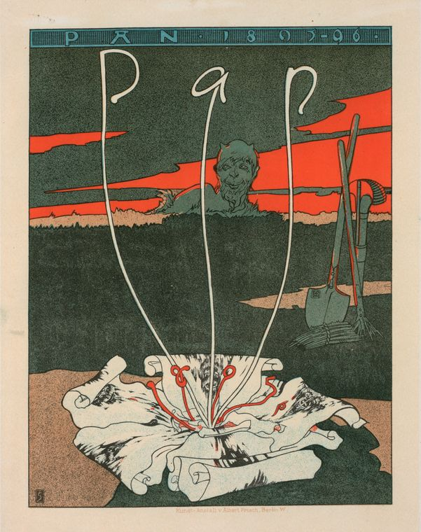 Joseph Sattler: Affiche allemande pour la revue artistique "Pan".